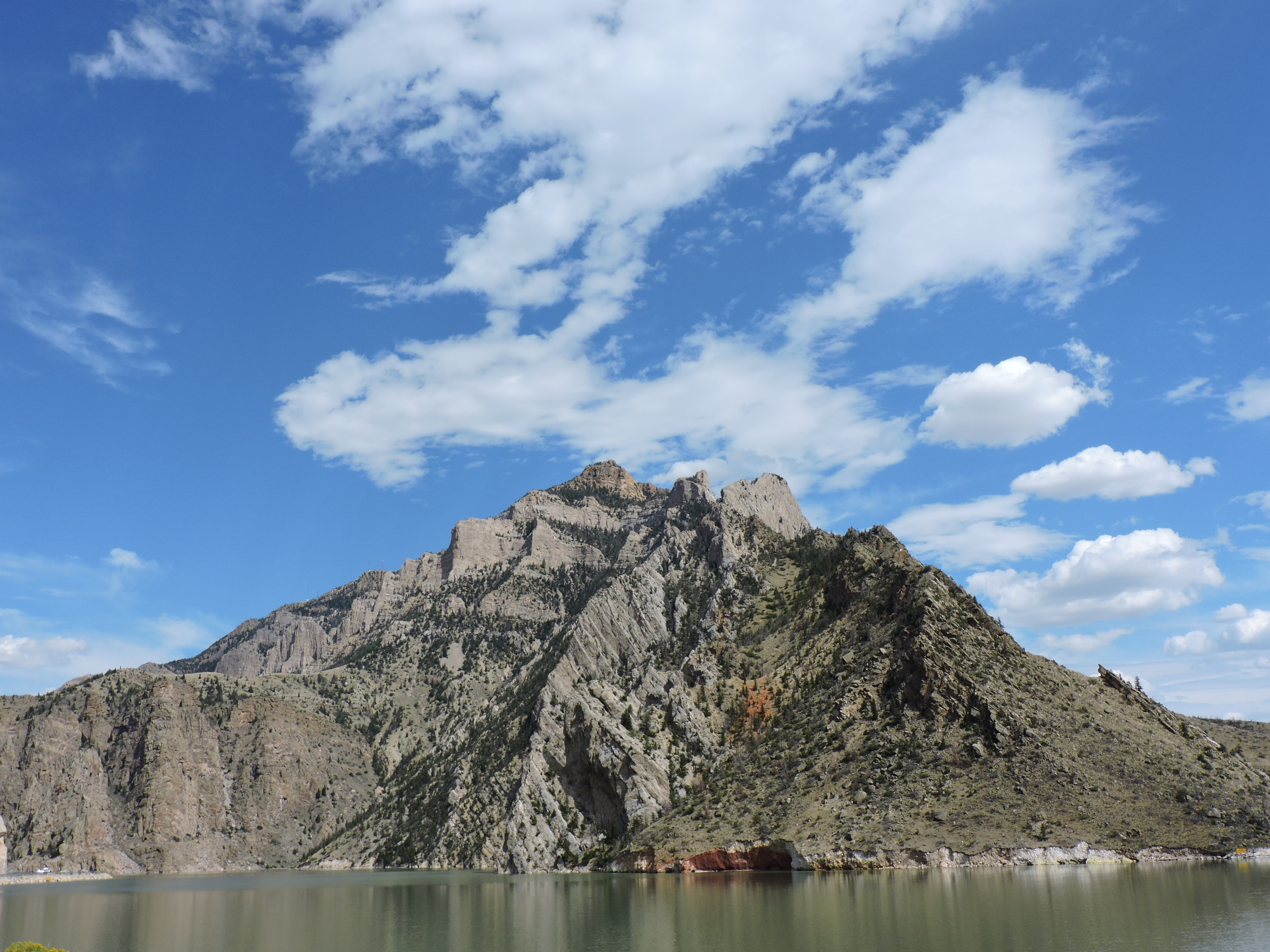 Cedar Mountain